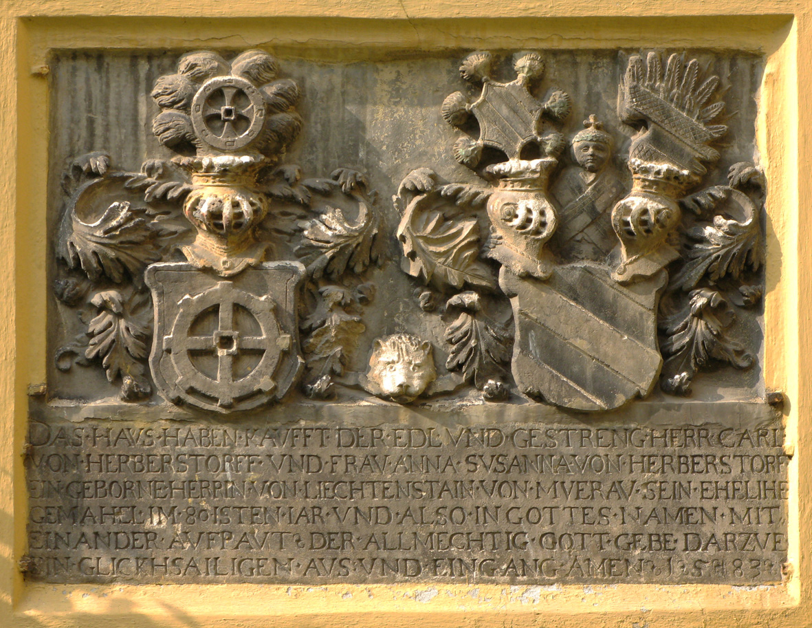 Bad Radkersburg, Wappentafel im Palais Herberstorff mit Allianzwappen Herberstorff und Liechtenstein von Murau